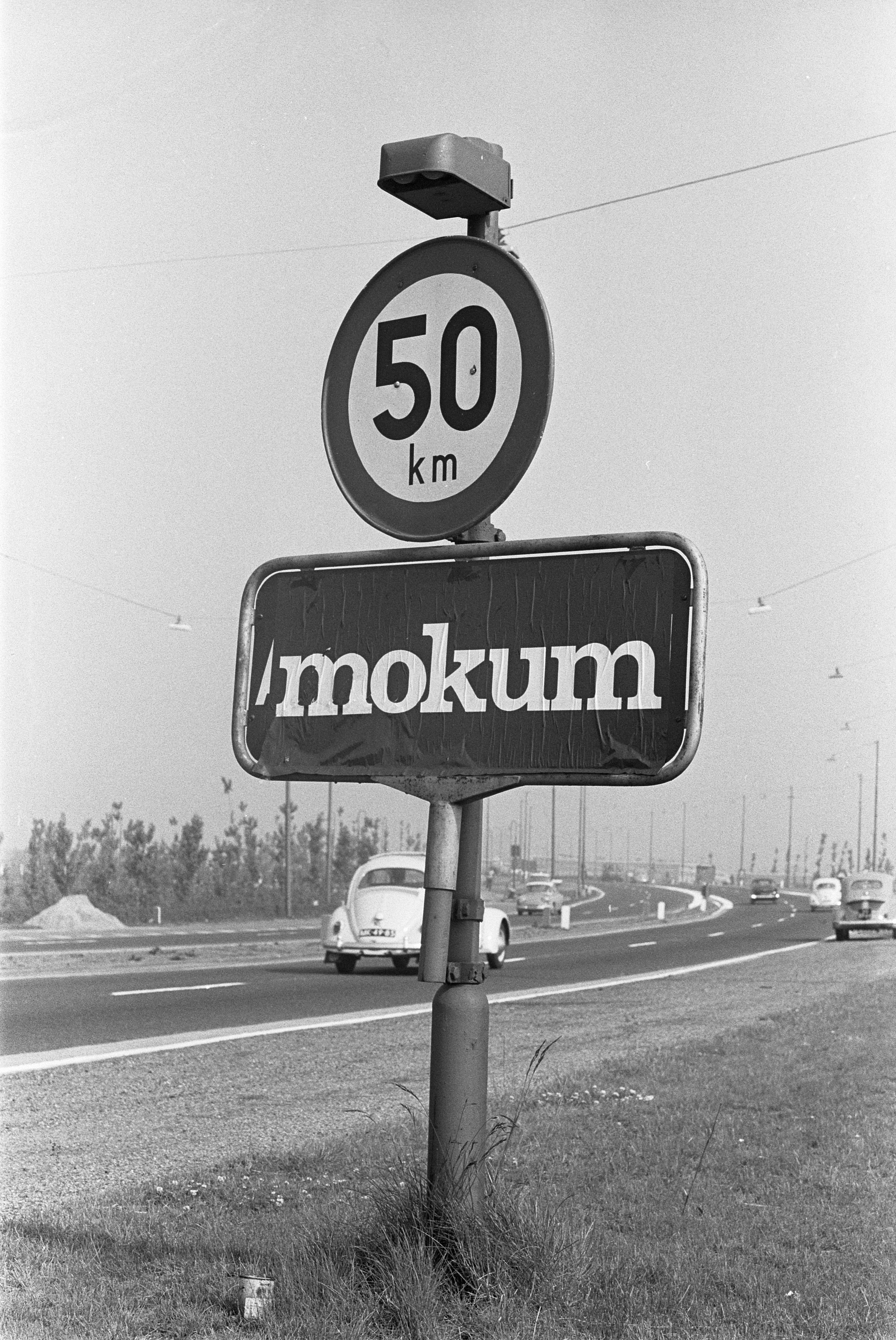 Collectie / Archief : Fotocollectie Anefo Reportage / Serie : [ onbekend ] Beschrijving : Borden Amsterdam overplakt met de naam Mokum, het bord aa de Utrechtseweg Datum : 7 juni 1963 Locatie : Amsterdam, Noord-Holland Trefwoorden : verkeersborden Fotograaf : Gelderen, Hugo van / Anefo Auteursrechthebbende : Nationaal Archief Materiaalsoort : Negatief (zwart/wit) Nummer archiefinventaris : bekijk toegang 2.24.01.05 Bestanddeelnummer : 915-2363